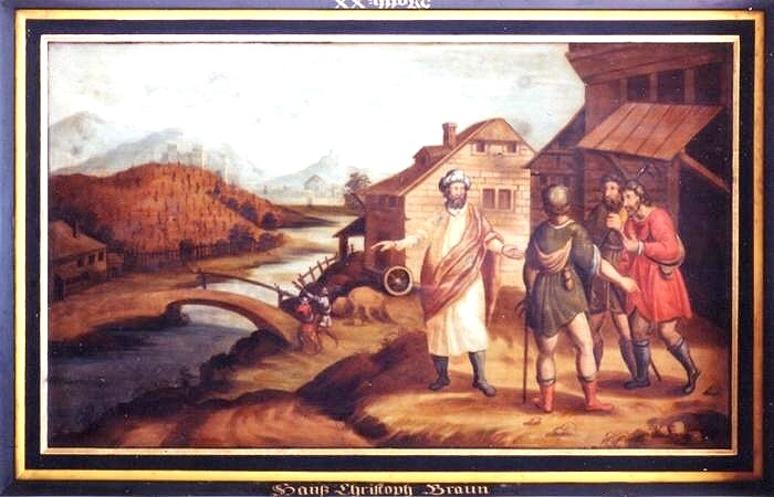 Ausschnitt aus der Kassettendecke in der Hospitalkirche Hof